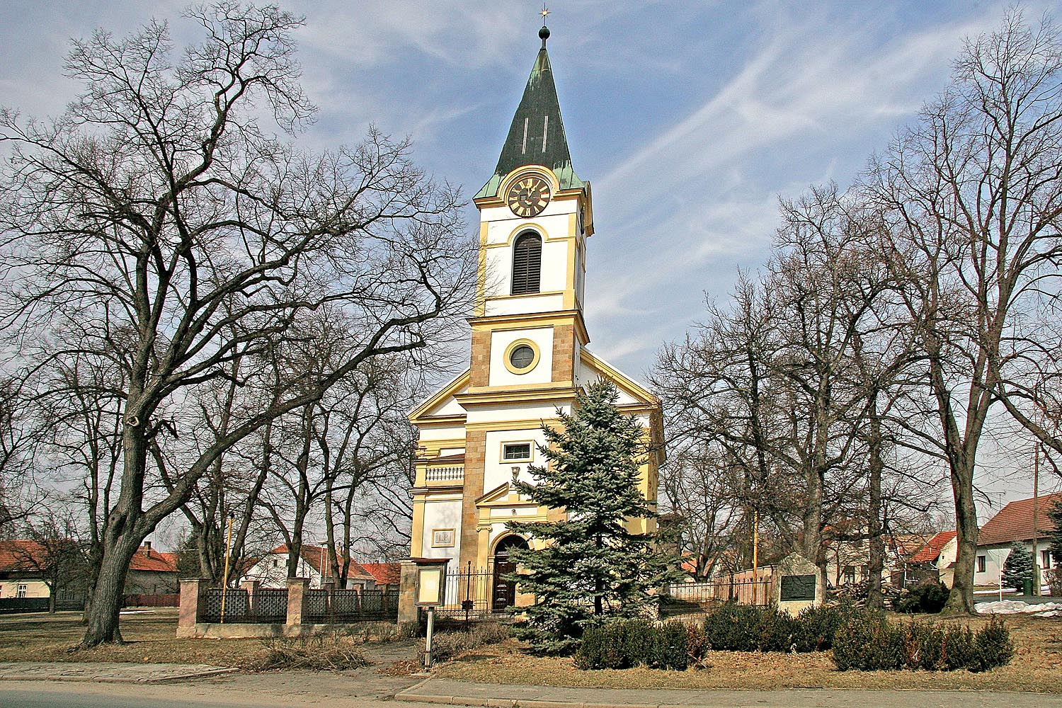 Evangelický kostel v Opolanech, district Kolín autor: Prazak date: 24. 3. 2006